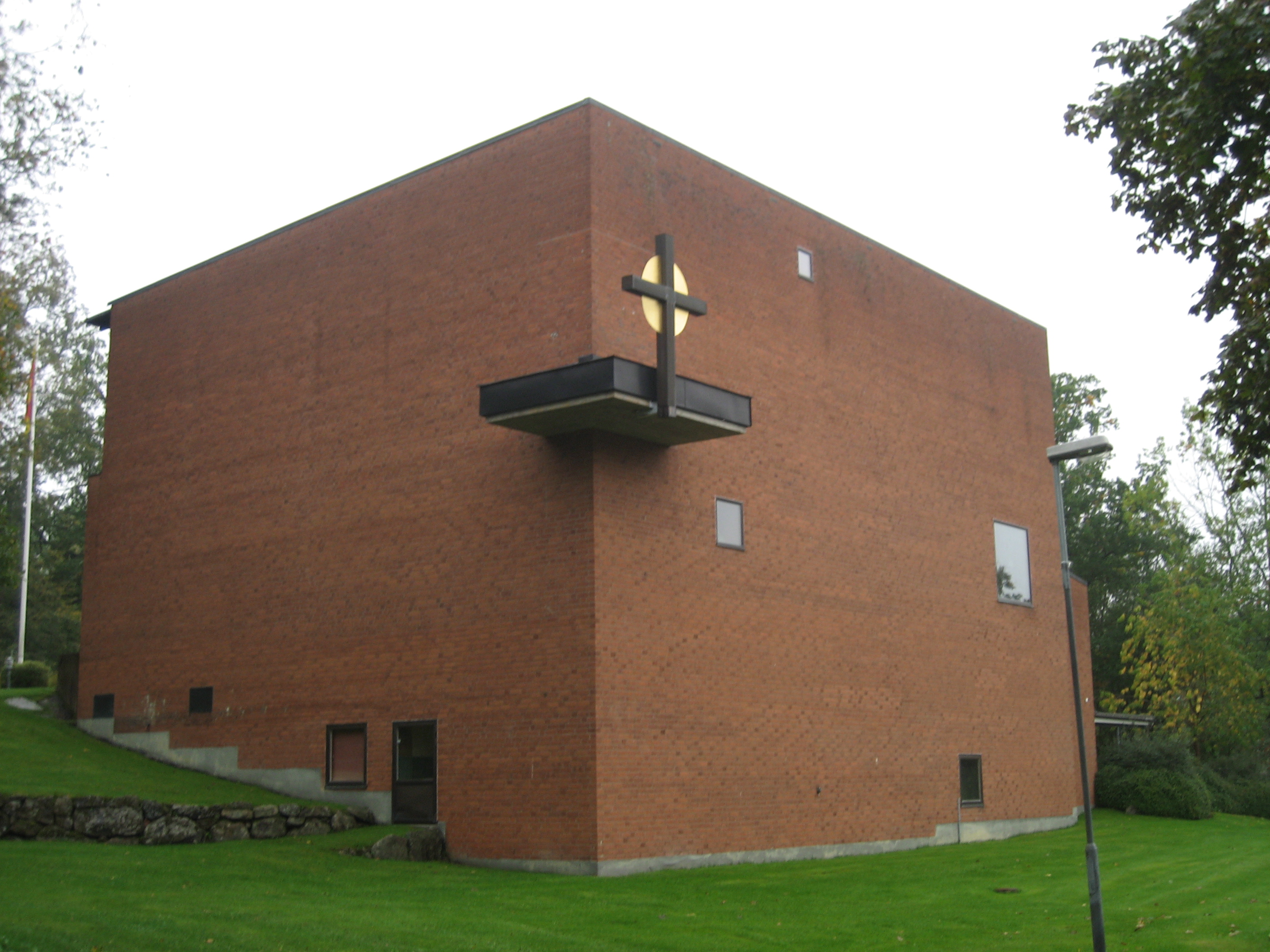 Adolfsbergskyrkan, Örebro, Sweden